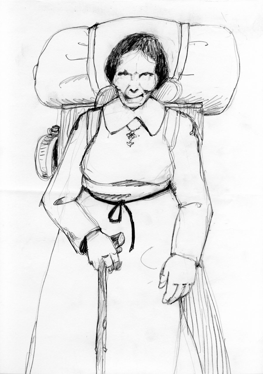 Portrait d'Esther Carpentier, prédicante baptiste (par Edouard Lekston)